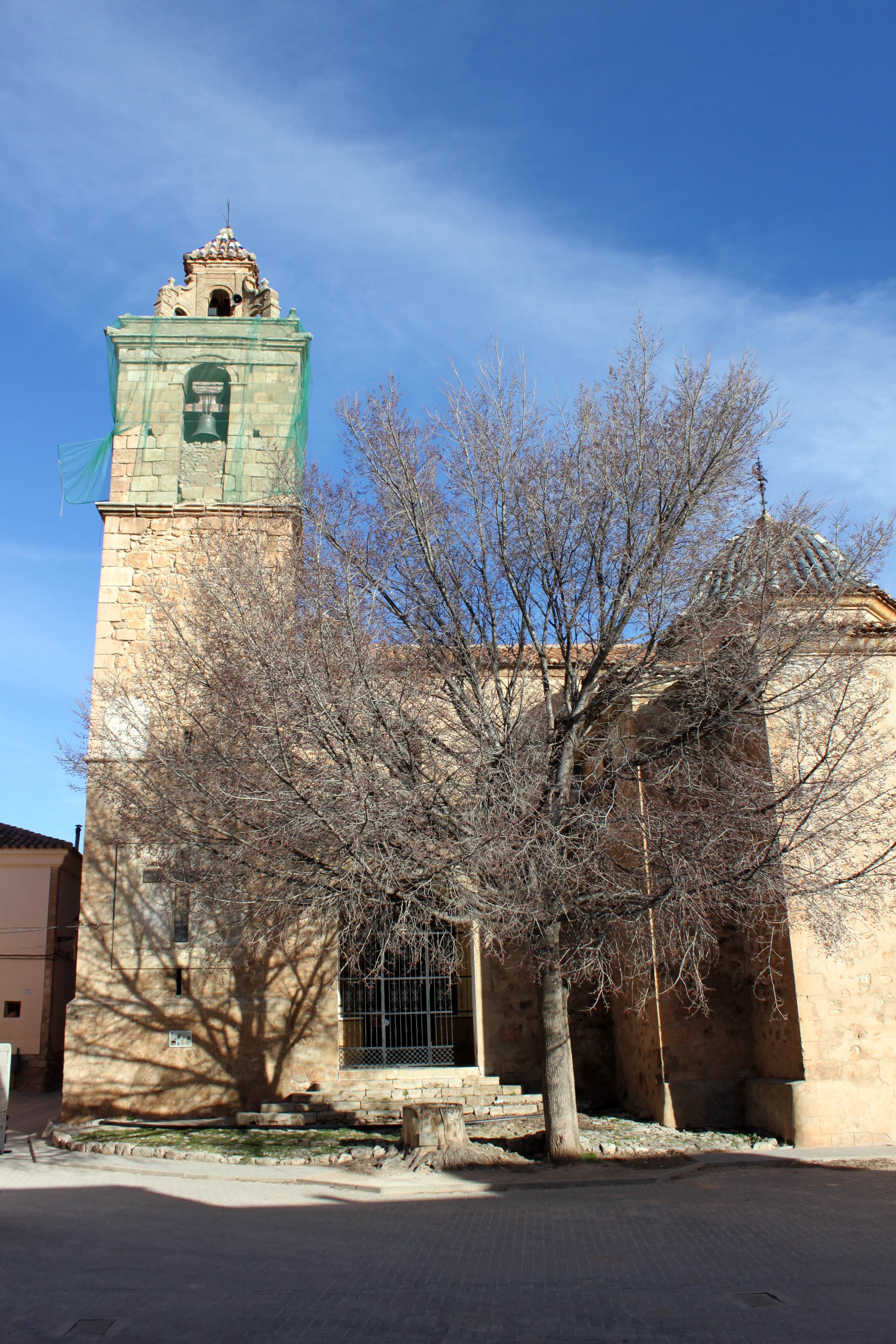 Iglesia parroquial de San Miguel Arcángel de Puebla de San Miguel, provincia de Valencia, Comunidad valenciana, España. 09.201-001.